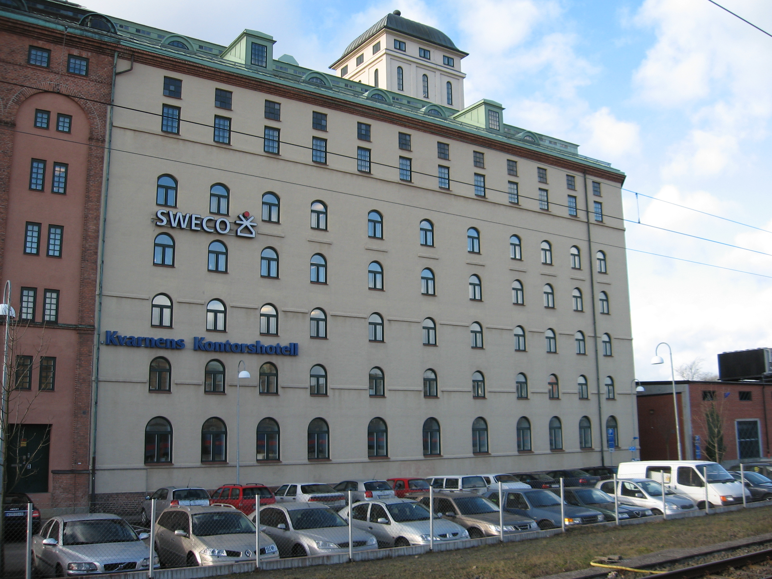 Kvarnen i Kristianstad. Före detta Mårten Pehrsons Valsqvarn, nu mera kontorshotell.